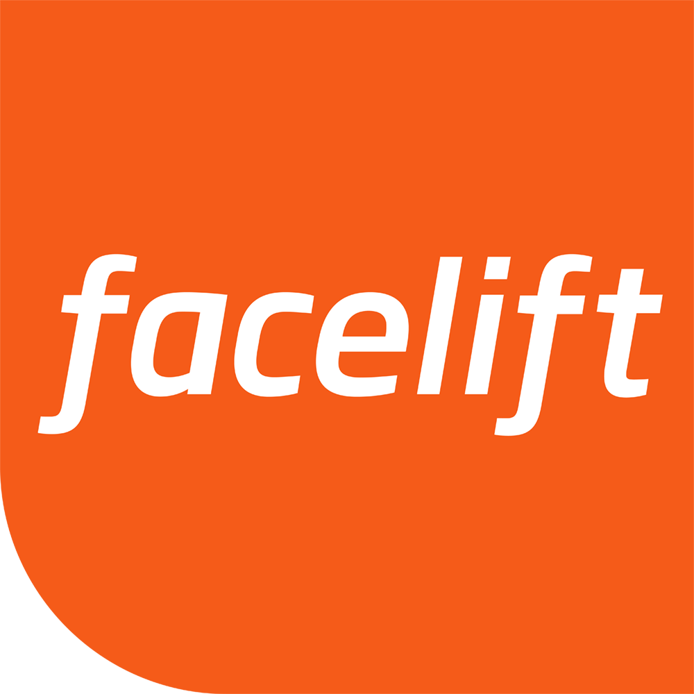 Logo facelift